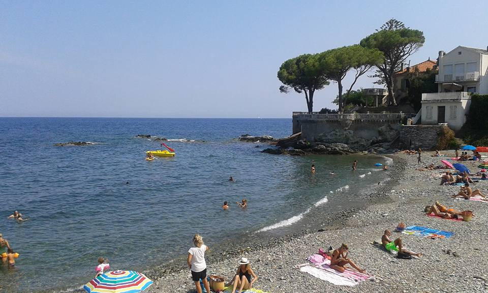 Plage de Grigione (ou Grisgione), marina de Grisgione, commune de San-Martino-di-Lota, département de Haute-Corse, région Corse. La plage? un après-midi de l'été 2015